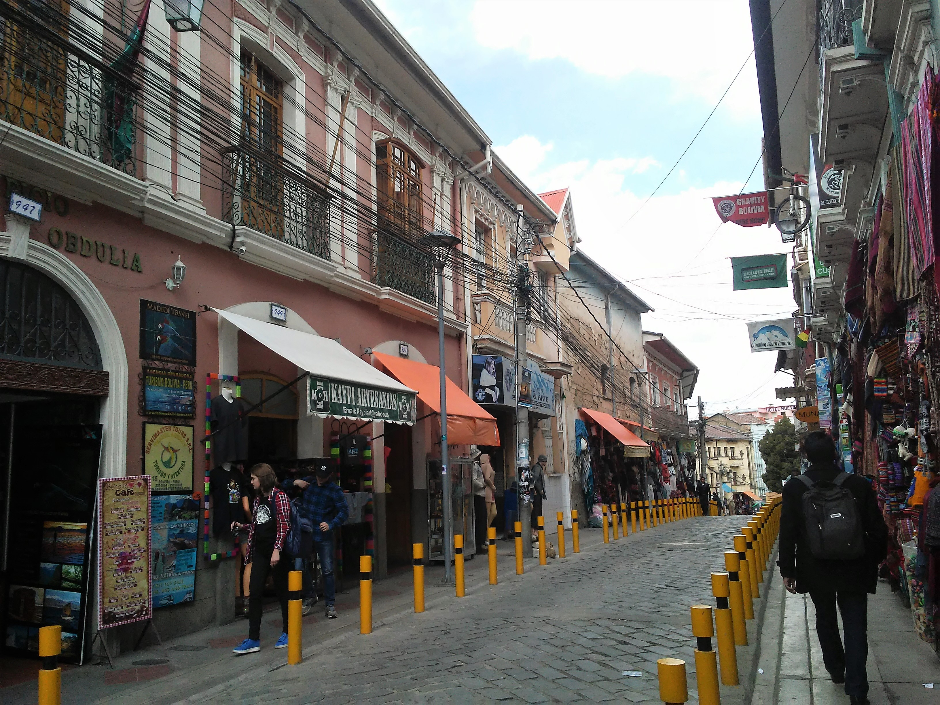 Casa Linares 2 This medium shows the protected monument with the number L/00-110 in Bolivia.